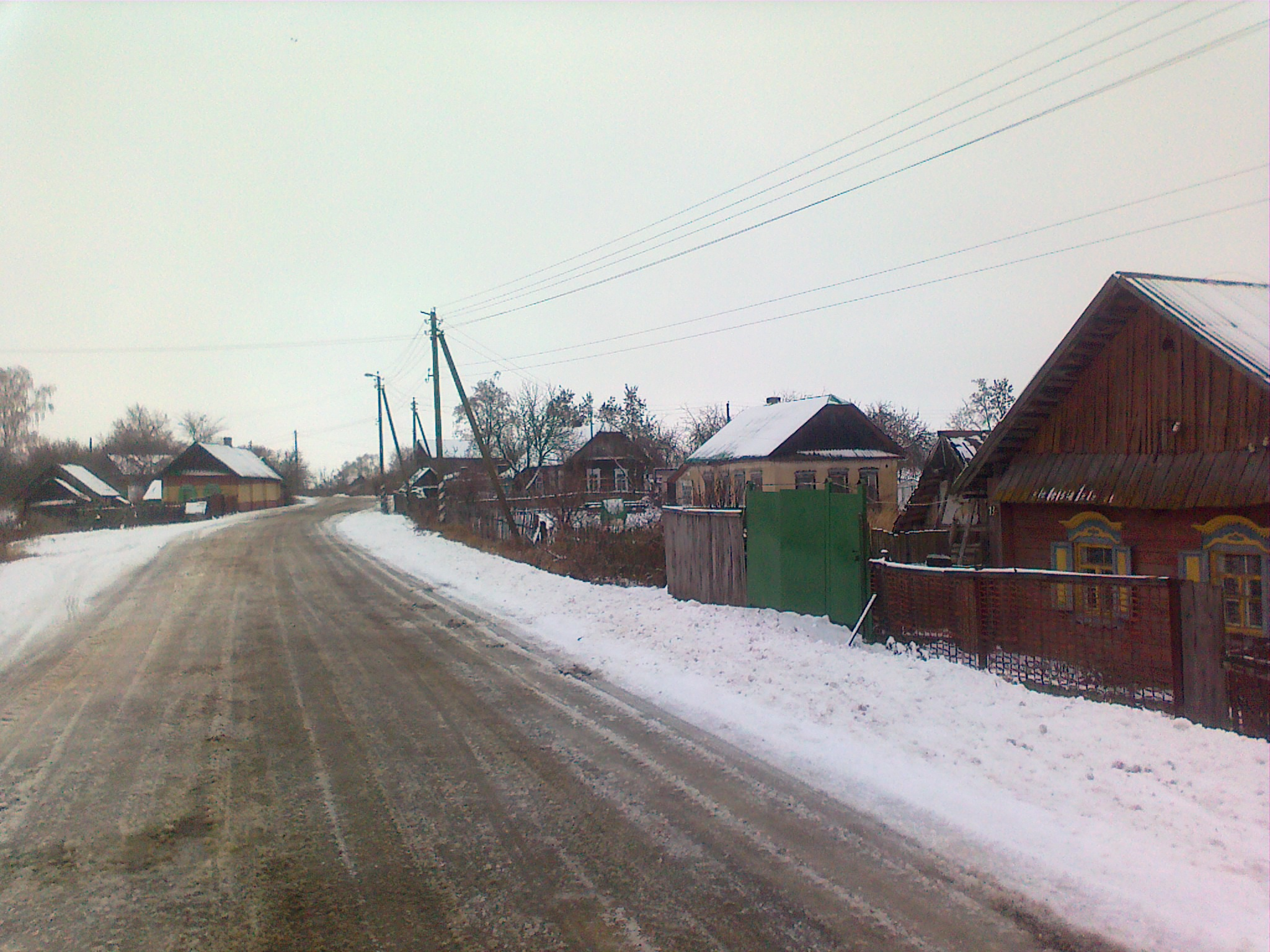 деревня Микуличи